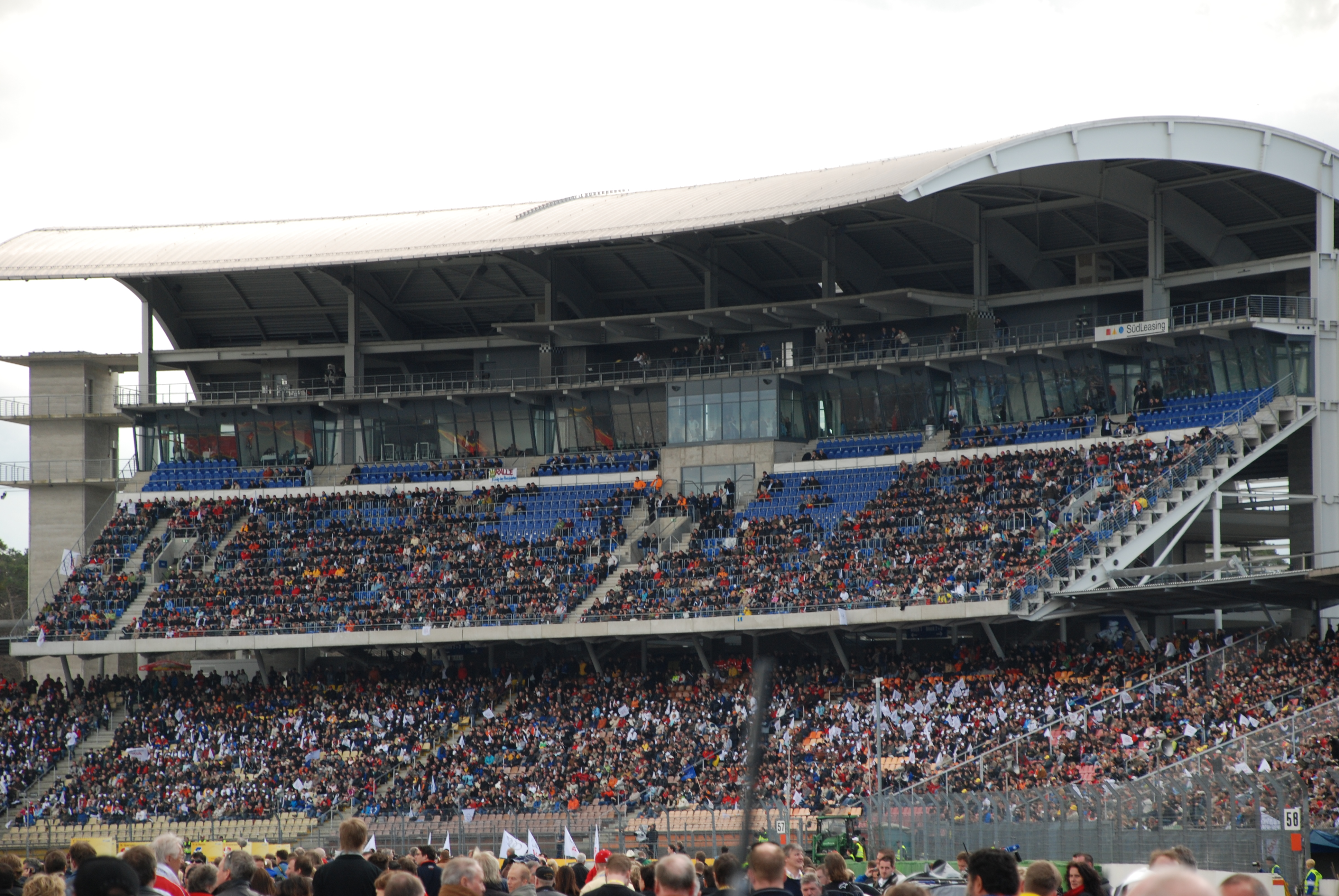 Tribüne beim Eröffnungsrennen der DTM in Hockenheim 2008